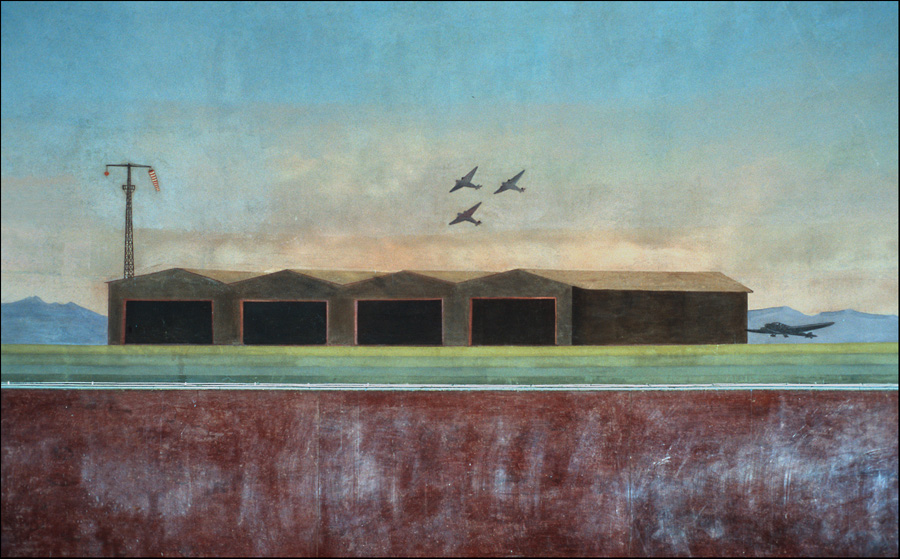 08/05/2009 : Guidonia (RM): chiesa della Madonna di Loreto (Giorgio Calza Bini, 1937)